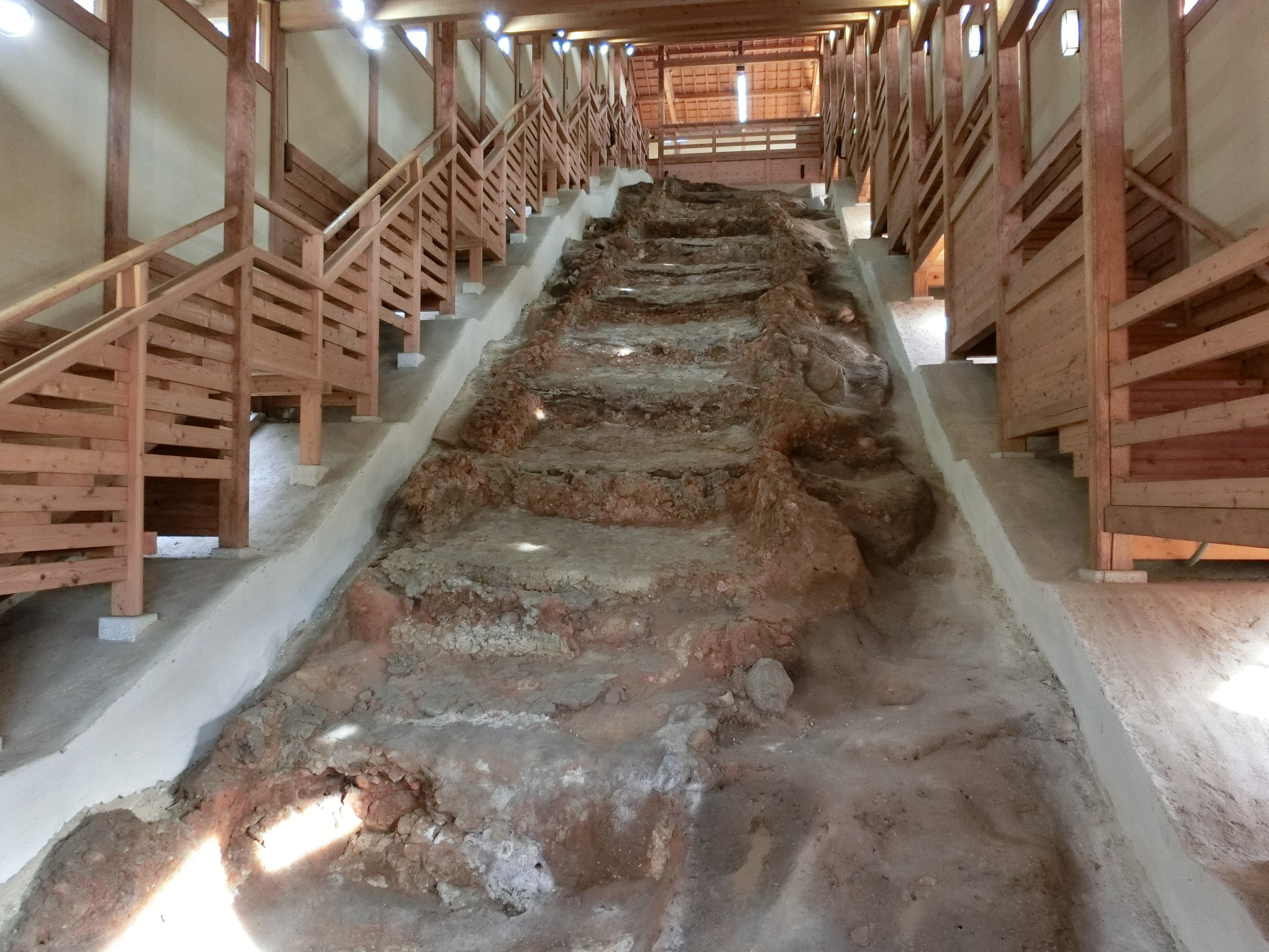 桃山時代から江戸時代にかけての美濃焼の窯跡。国指定史跡。